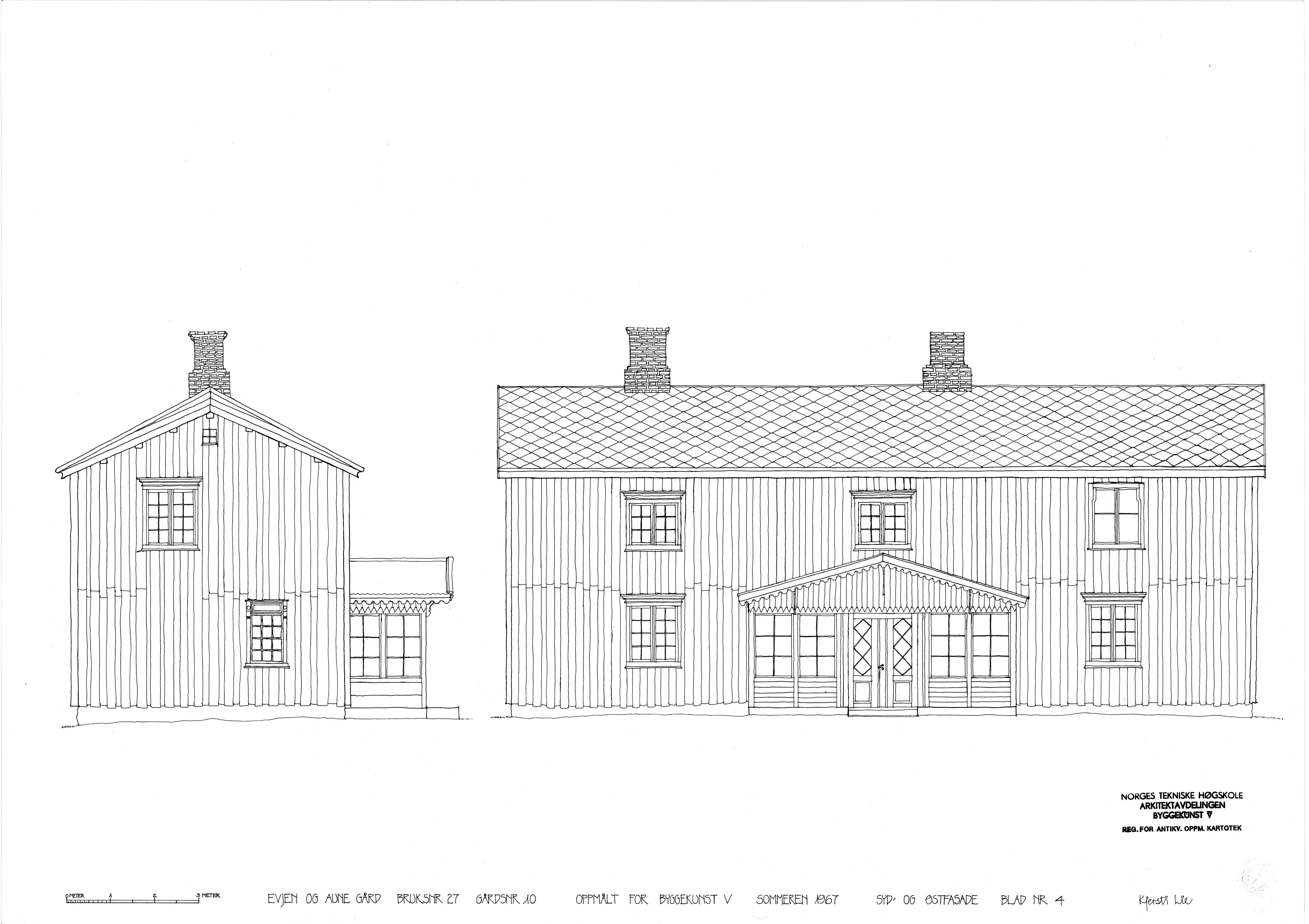 Eget verk. Oppmåling av våningshuset på Evjen gård, gnr 10, bnr 27, Orkdal, foretatt sommeren 1967. Dette er en av plansjene. I tillegg finnes planer og snitt og de to andre fasadene, samt detaljer fra interiøret. Bygningen er, med unntak av inngangspartiet, et typisk eksempel på trønderlåna, det tradisjonelle bolighuset på trønderske gårdsbruk.